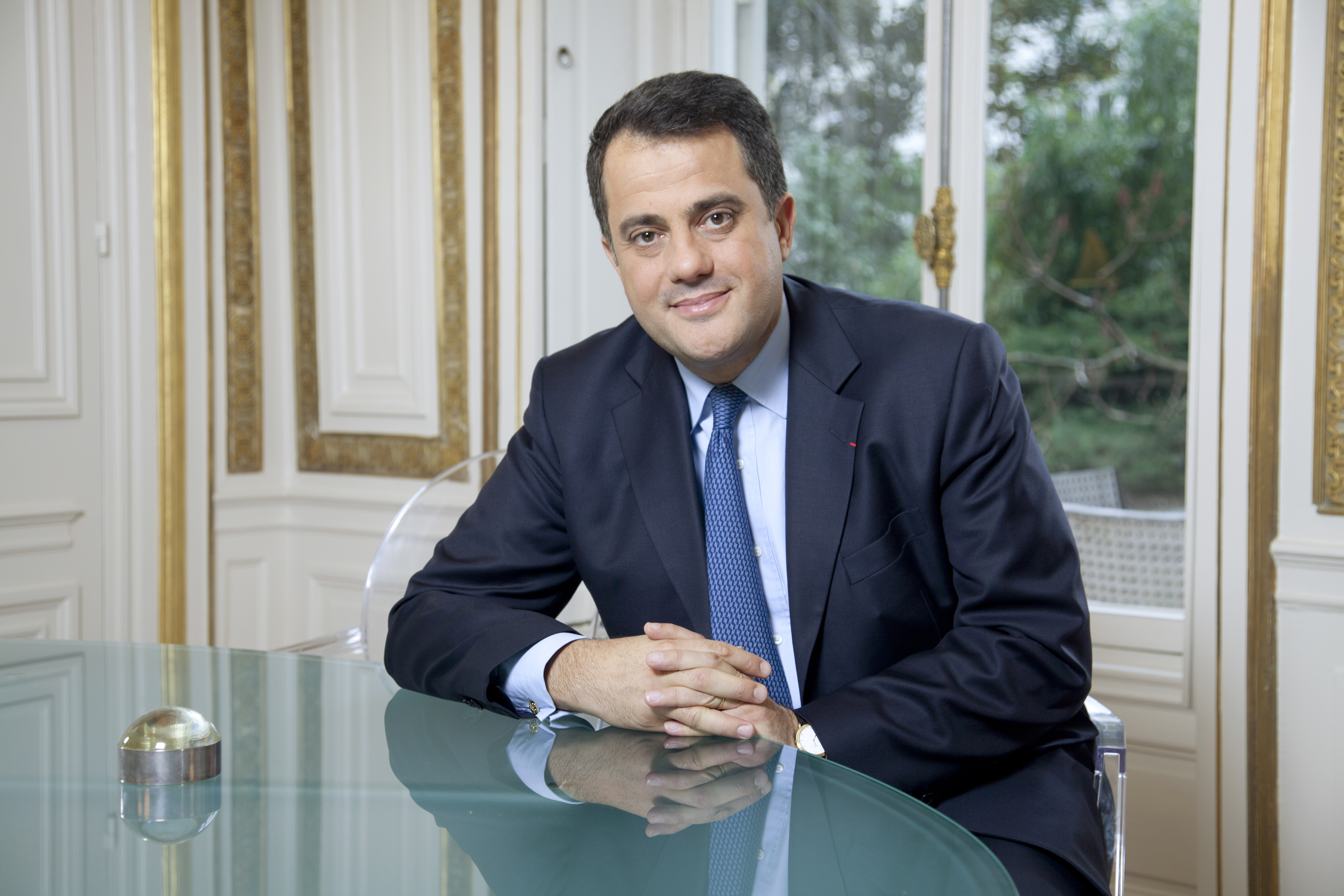 Frédéric Lemoine, Président du Directoire Wendel